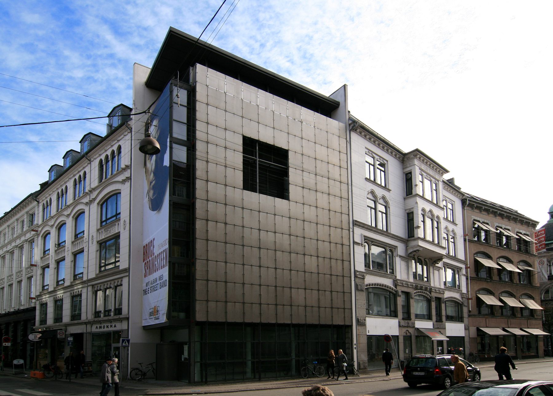 BT-huset, Kristen Bernikows Gade, København. Nyeste del tegnet av Henning Larsen i 1994.